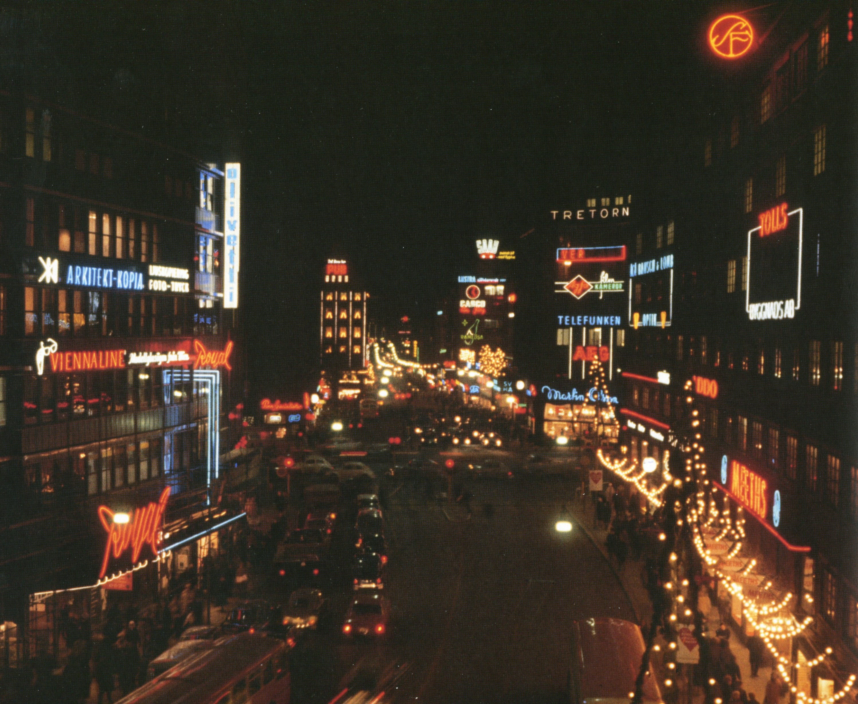 Kungsgatan västerut med korsningen Sveavägen, biograf "Royal" till vänster